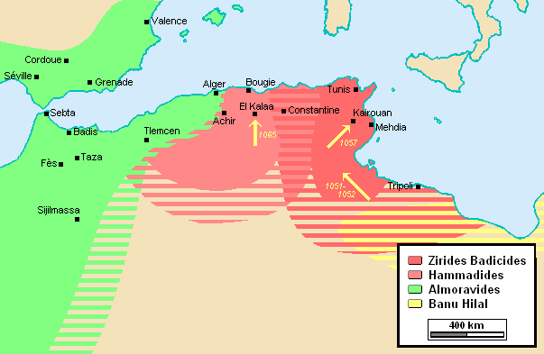 Le territoire des Ziride et des Hammadides après l'avènement des Almoravides Carte inspirée de